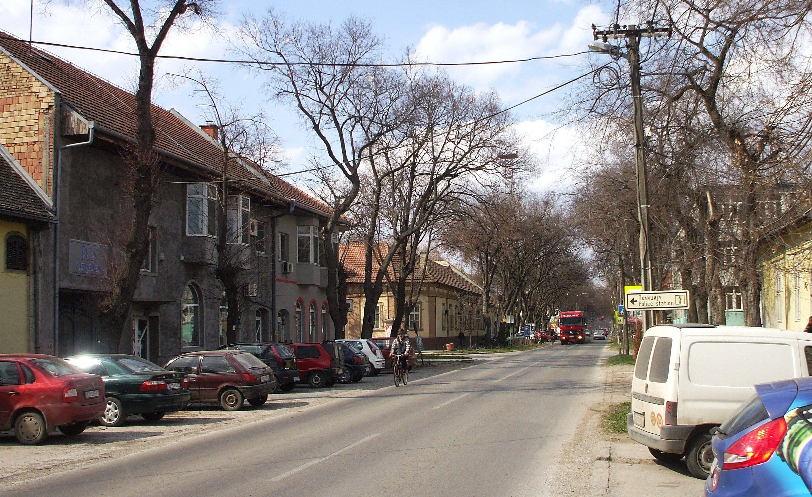 Главна улица у Оџацима.